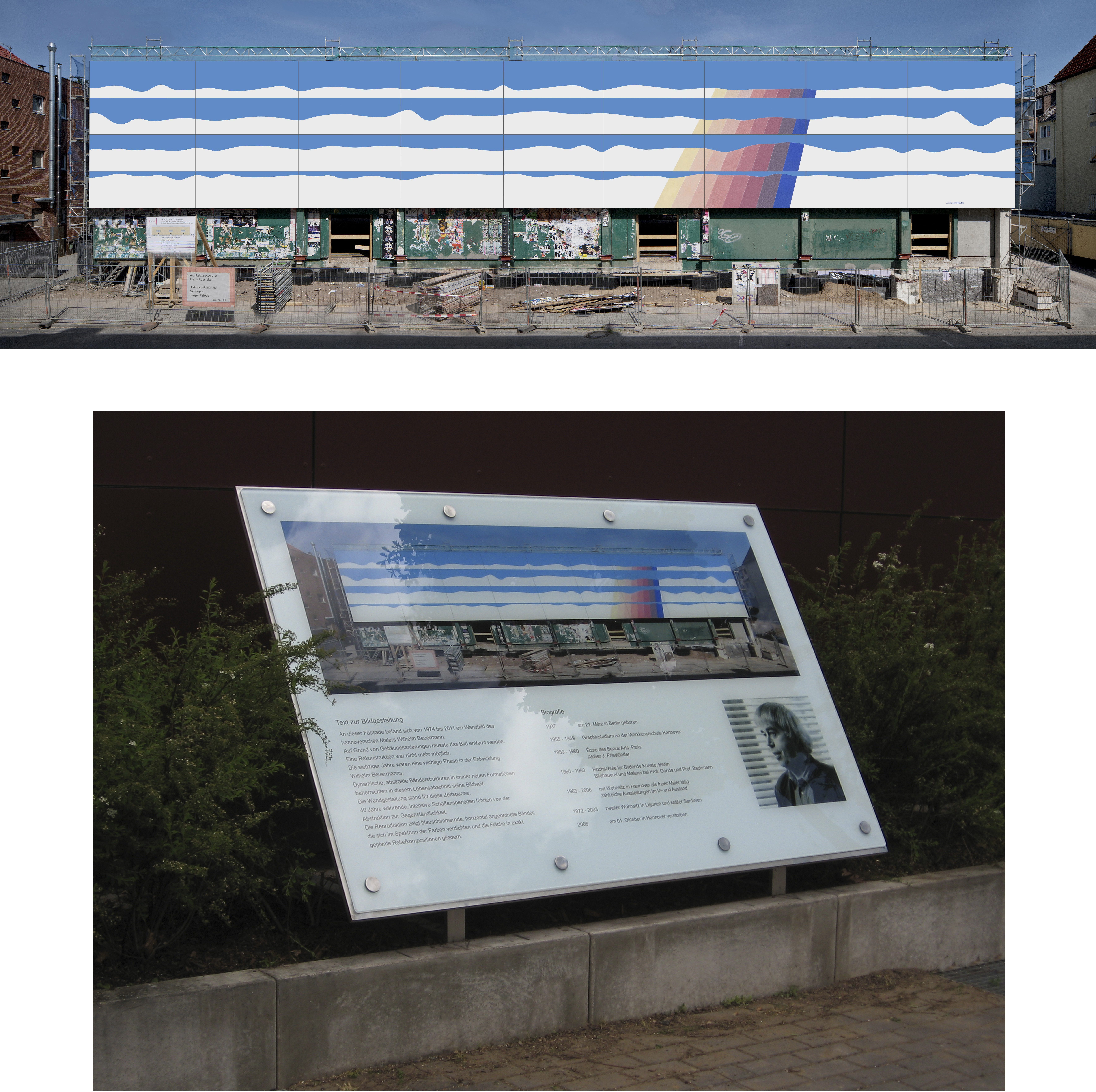 Bildbearbeitung der Fassadenmalerei, Gedenktafel W. Beuermann